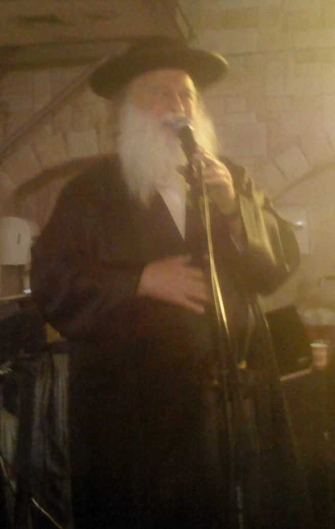 דדי בן עמי